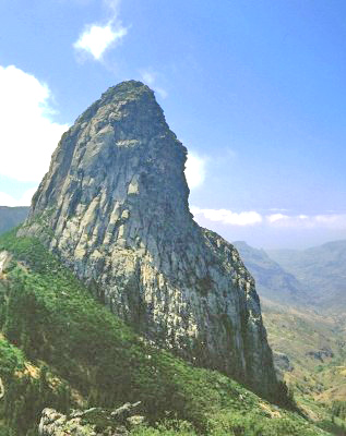 Agando-Fiels am Garajonay-Nationalpark